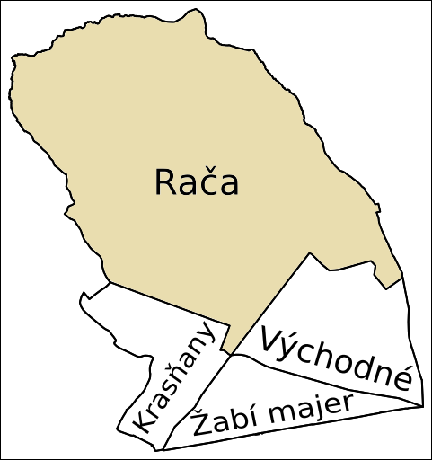 Rača centrálna, Bratislava